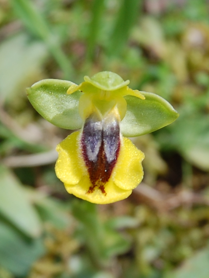 Ophrys phryganae Riserva naturale Monte Pellegrino, Palermo